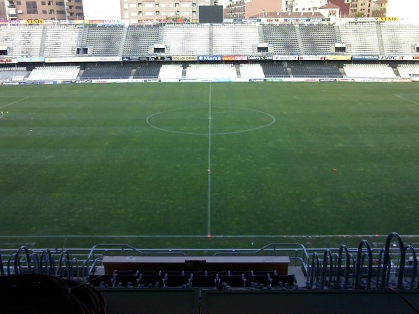 Vista del Nou Estadi Municipal de Castalia